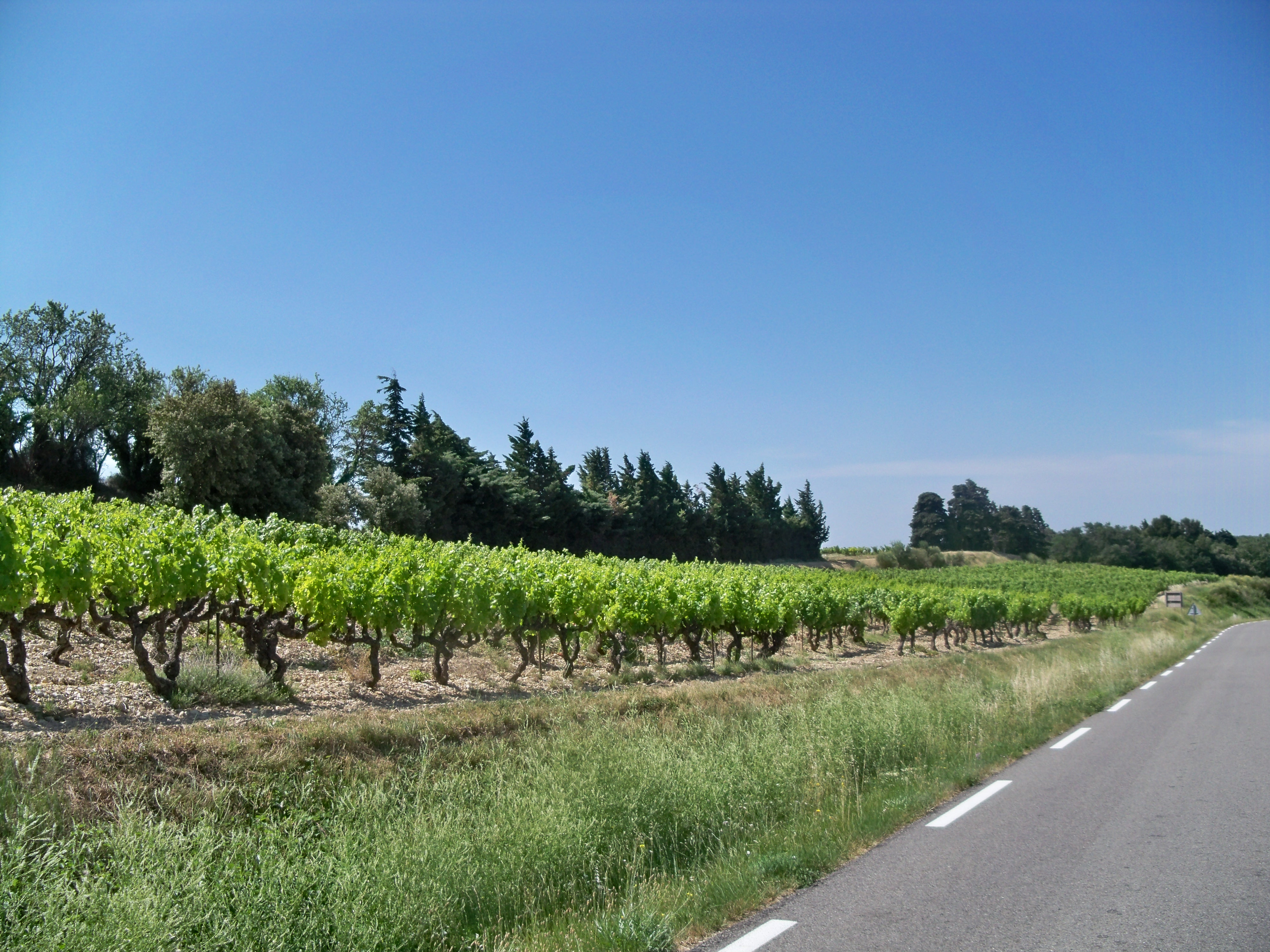 vignobles du Rhône, Vaucluse